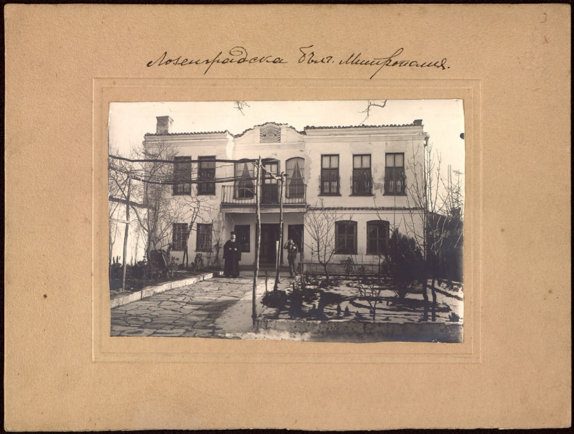 Българската митрополия в Лозенград.